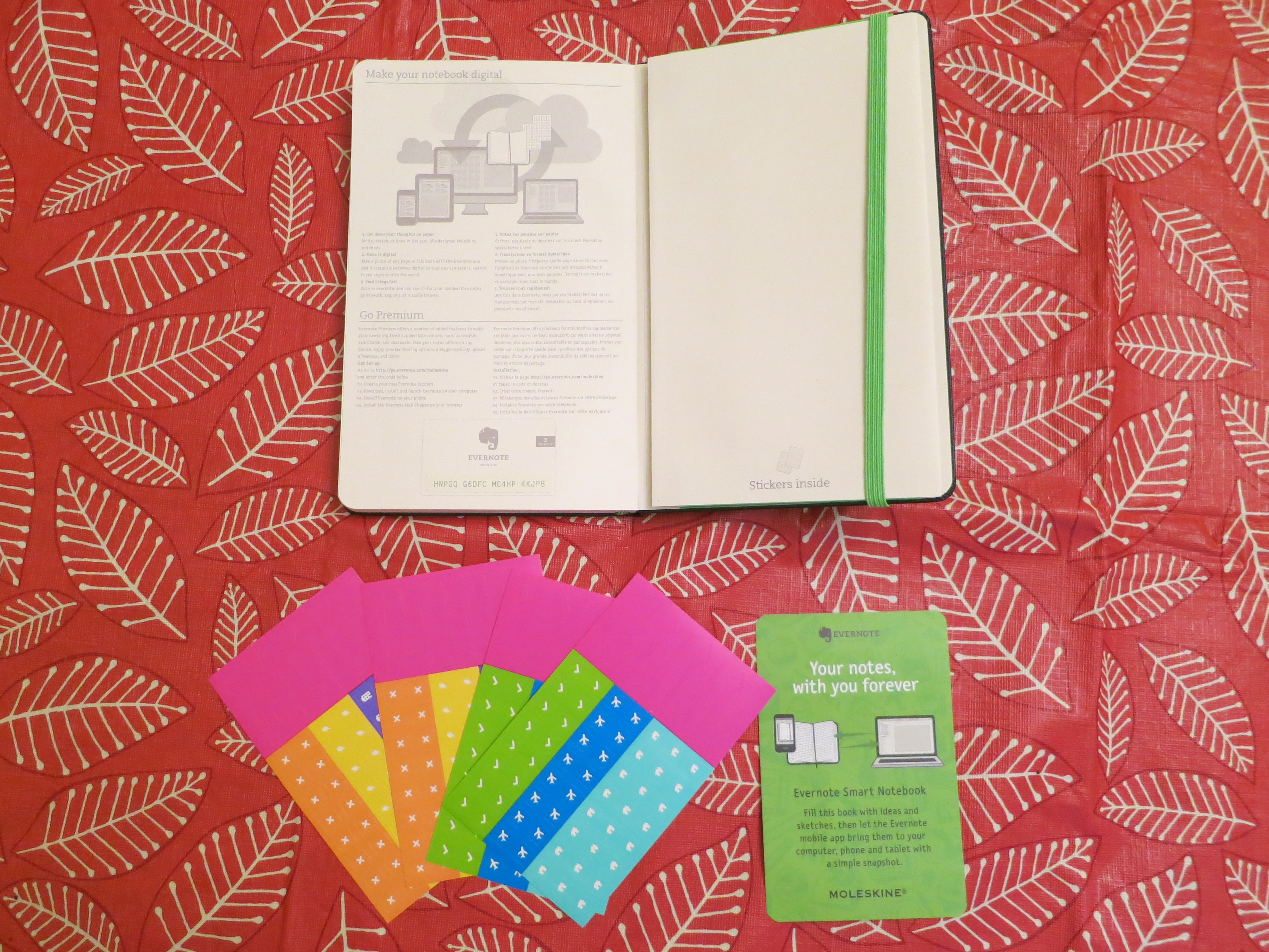 Blog Post